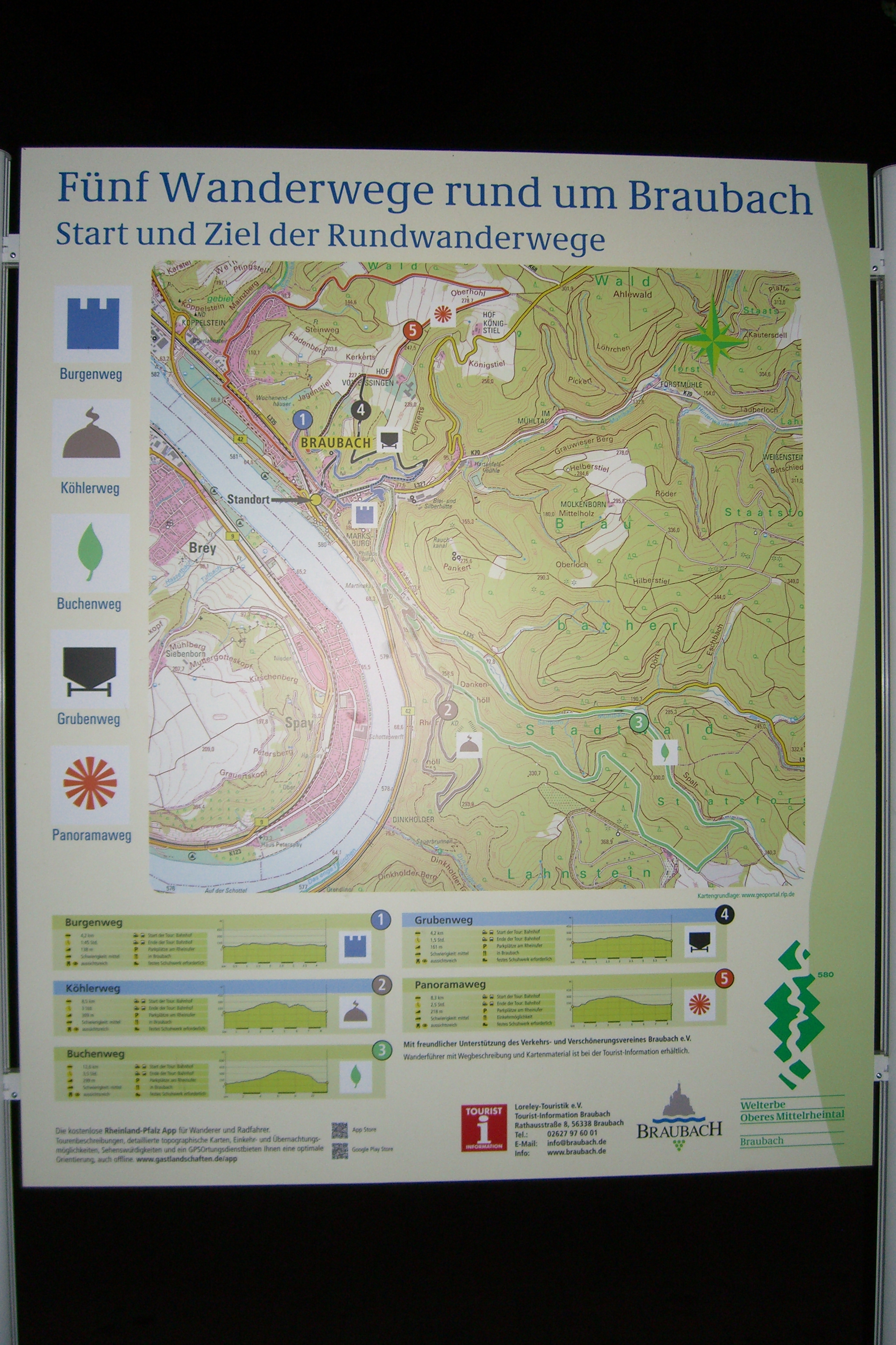 Fünf Wanderwege rund um Braubach - Die Karte stellt den Start und das Ziel der Rundwanderwege (Burgenweg, Köhlerweg, Buchenweg, Grubenweg und Panoramaweg) dar. Die fünf Rundwanderwege in Braubach sind eine schöne Alternative zum Rheinsteig. weitere Quellen: Burgenweg: Köhlerweg: Buchenweg: Grubenweg: Panoramaweg